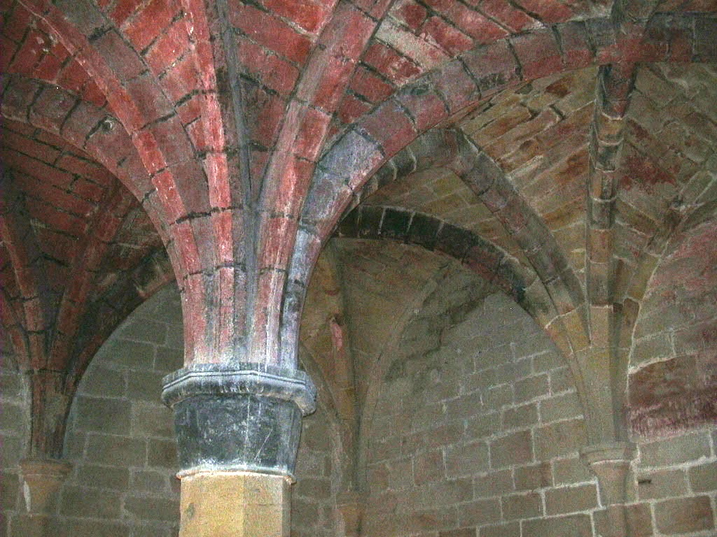 Rueda - Scriptorio